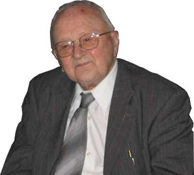 Michel Spanneut, le 11 Novembre 2009 (90 ans)